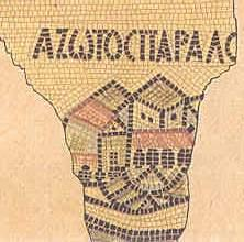 אשדוד במפת מדבא, שנת 542